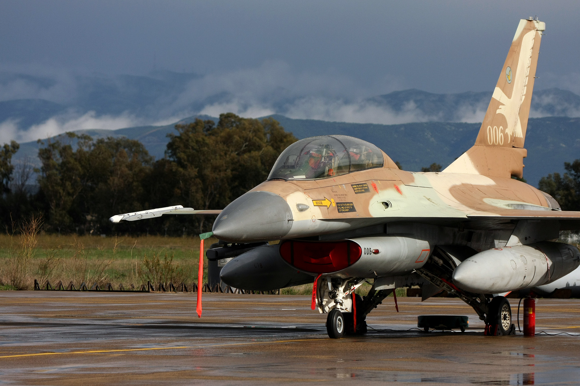 November 16, 2010. The Israel Air Force and the Italian Air Force conclude an extensive, two-week exercise in Sardinia. For more information, see: wp.me/ppbEs-13D חיל האוויר הישראלי וחיל האוויר האיטלקי מסכמים תרגיל בן שבועיים בסרדיניה, אשר באיטליה.